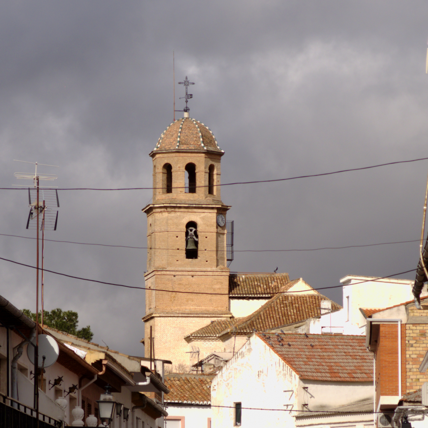 Torre de la Iglesia Parroquial